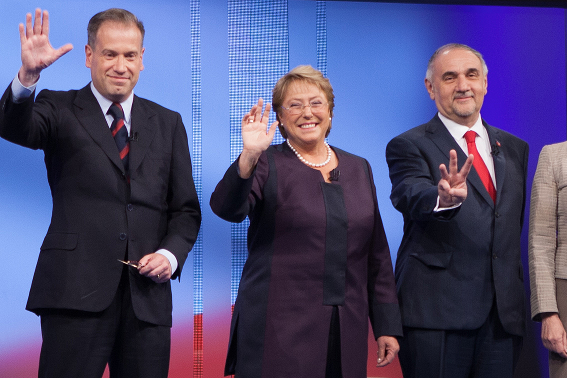 Debate presidencial Anatel 2013.